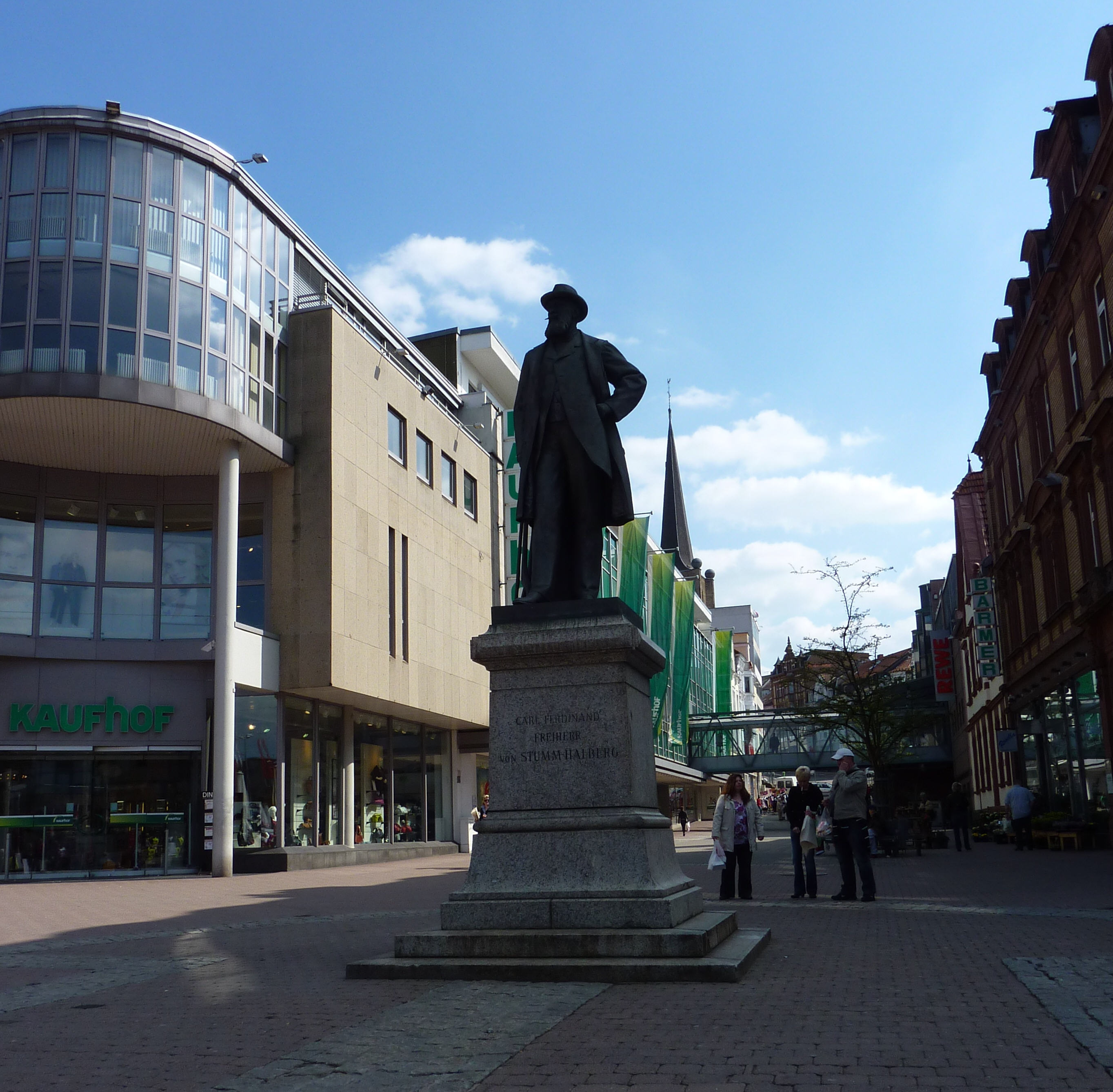 Denkmal für Carl Ferdiand von Stumm-Halbach auf dem Stummplatz in Neunkirchen